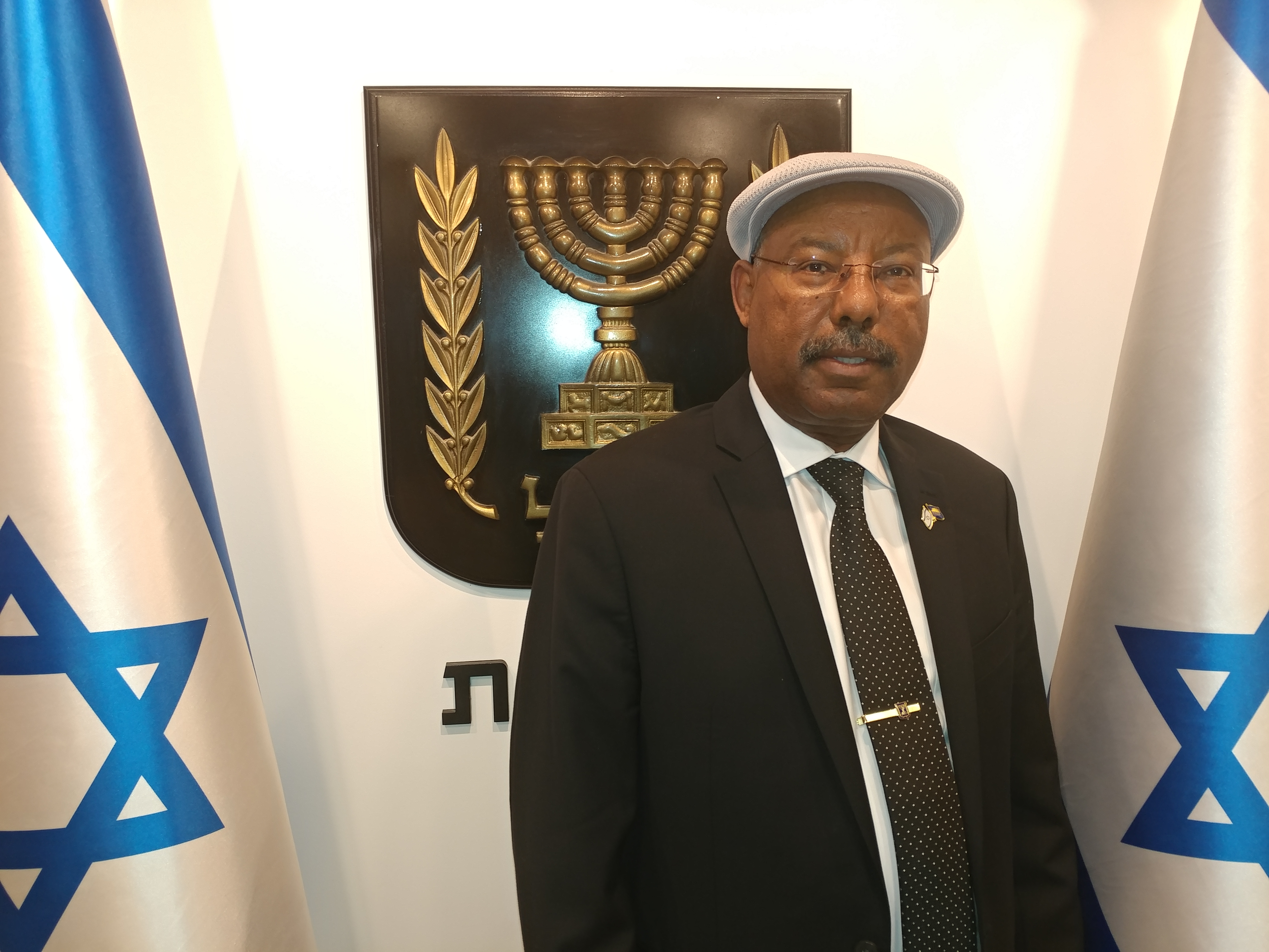 ח"כ אברהם נגוסה